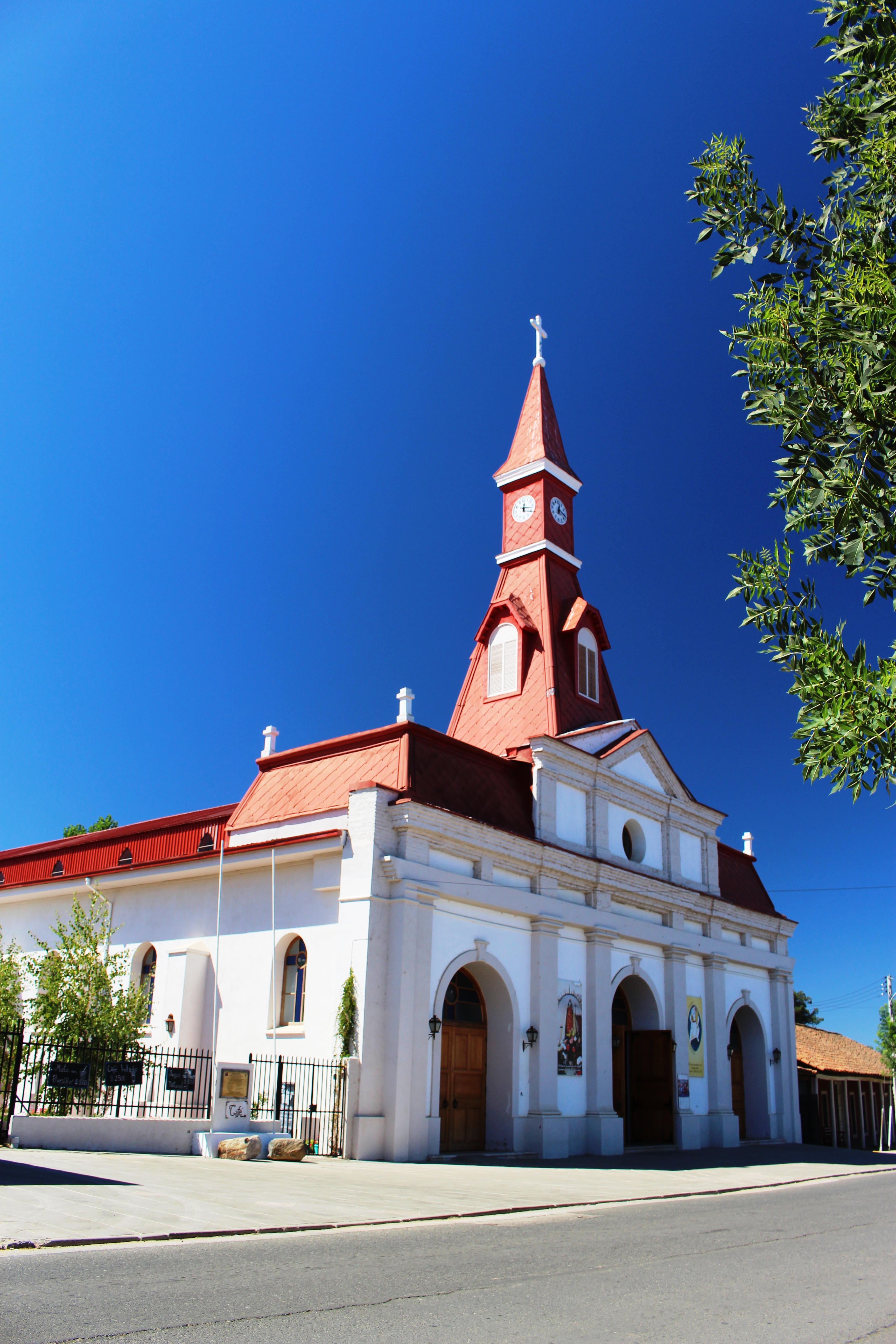 Frontis Parroquia Nuestra Señora de las Nieves, comuna de Peredones, Chile